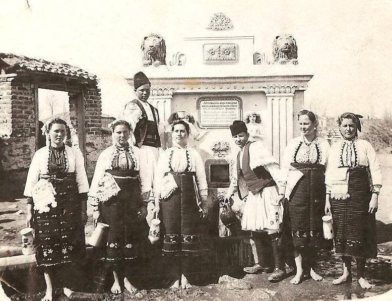 Струмичко Добрејци во 1941